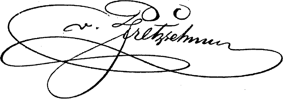 Unterschrift Adolph von Pfretzschner